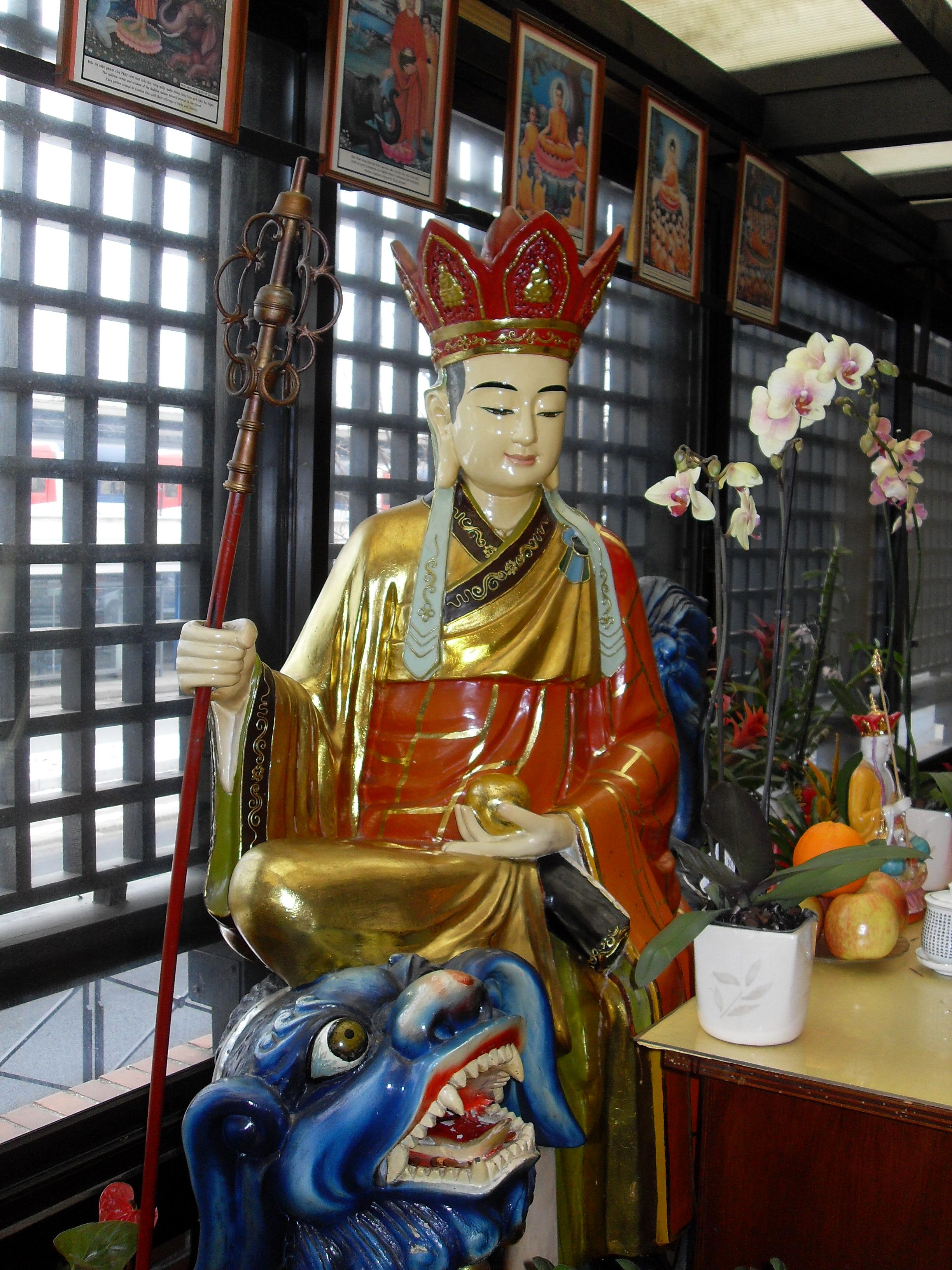 Joinville-le-Pont - Temple bouddhique Linh Son - statue de Ksitigarbha (en vietnamien Địa tạng) chevauchant un chien des enfers (ou un lion?) de couleur bleu-nuit